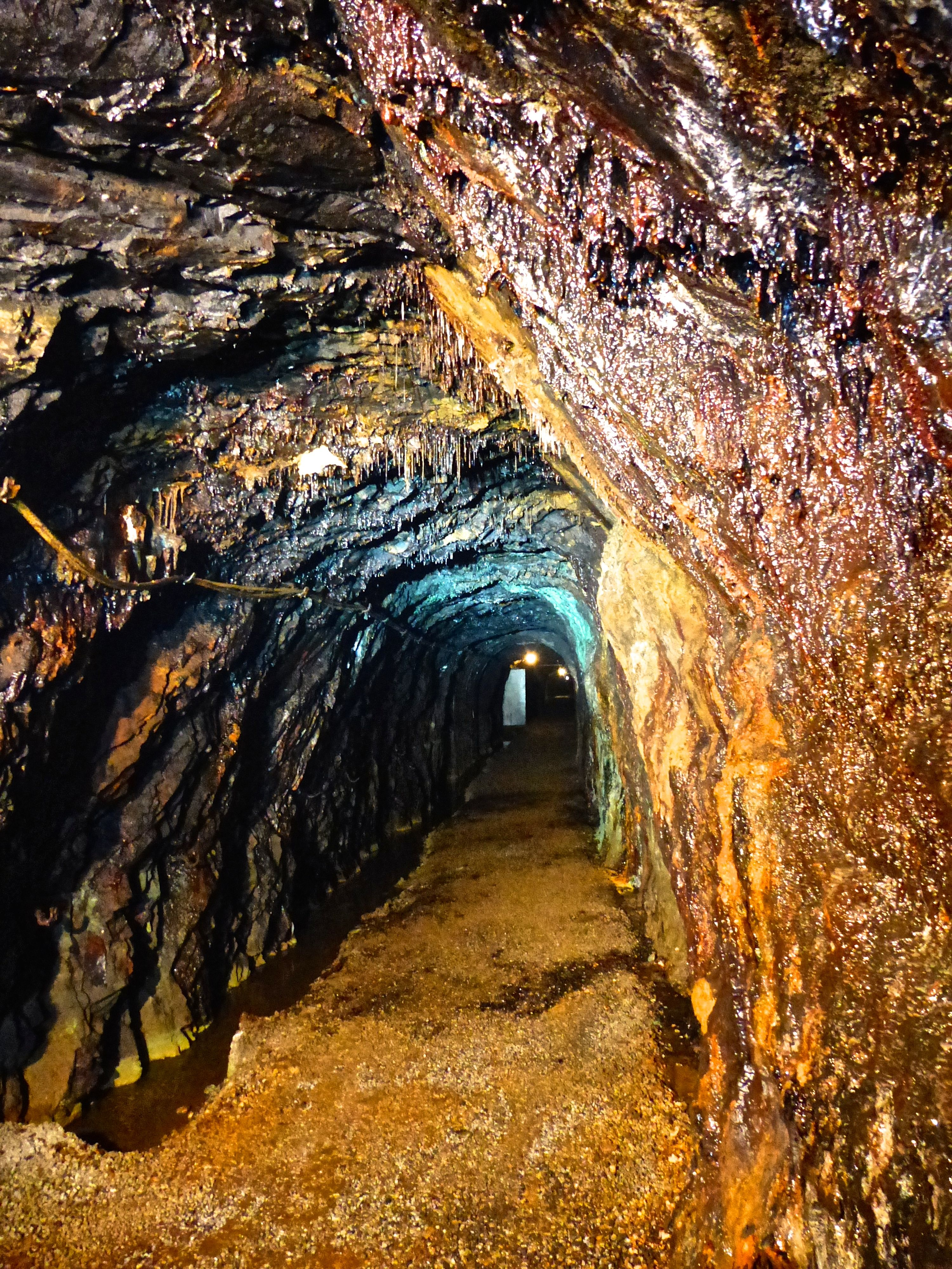 Kilianstollen (Grube Friederike) Blick in einen Abbau (Eisen- und Kupfermineralisation)